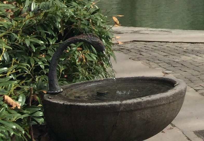 Löwendenkmalbrunnen beim Löwendenkmal in Luzern. Der kleine Trinkwasserbrunnen mit einer Röhrenplastik in Schlangenform wurde 1945 aufgestellt.